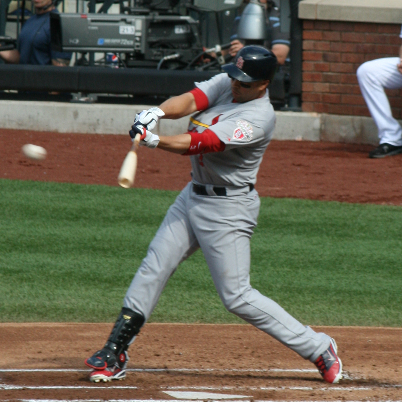 Carlos Beltrán